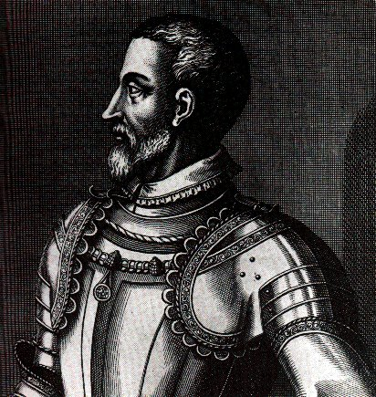 sujet: François Ier de Guise licence: Domaine public